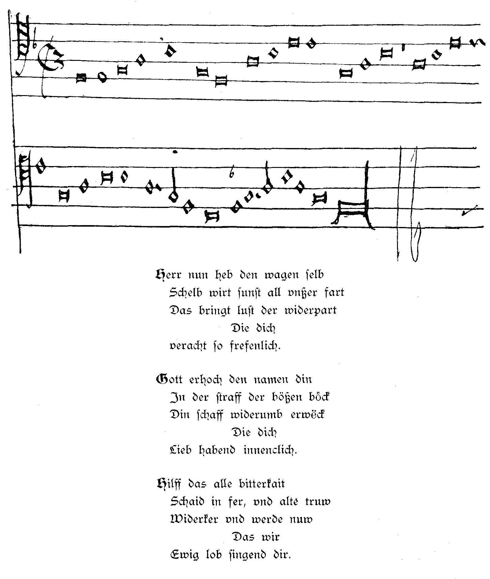 Ulrich Zwingli (Text und Melodie): Herr, nun heb den Wagen selb in der Fassung bei Johannes Kessler, manuell kopiert von Emil Egli 1902